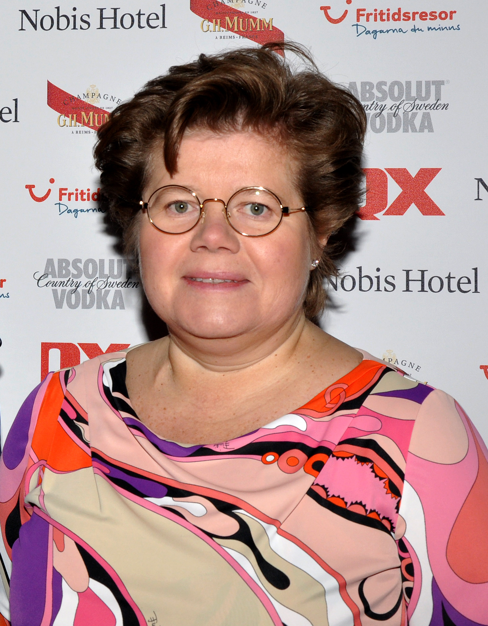 Gaygalan 2011 Margareta Åberg